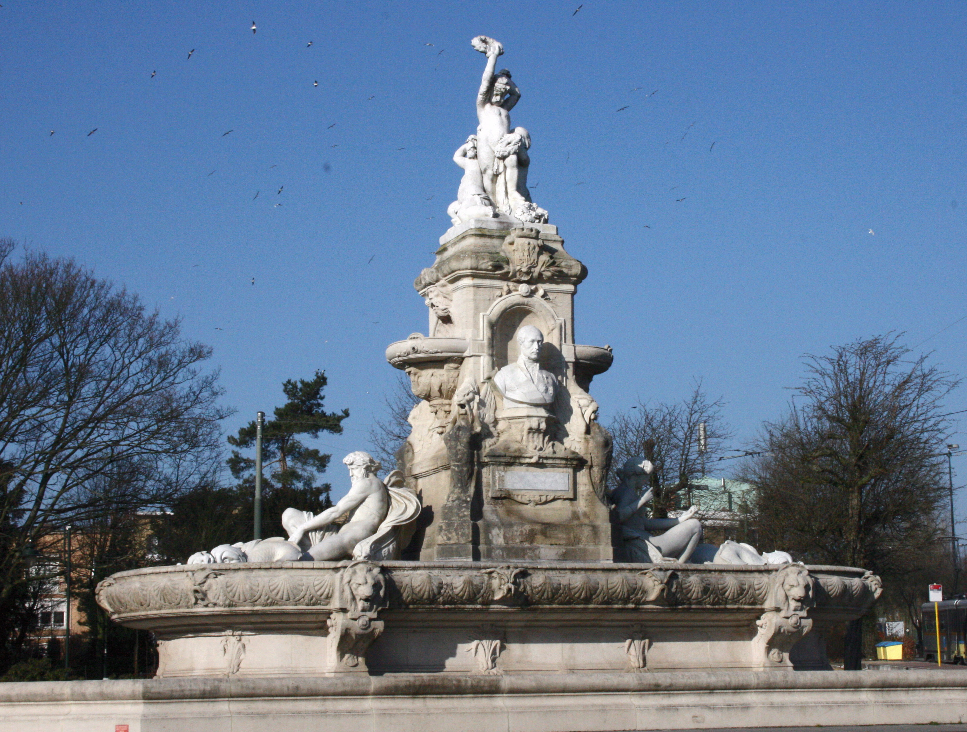 Fontein van Charles de Brouckère, Palfijnsquare, Laken (Brussel). Architect: Henri Beyaert. Beeldhouwers: P.L. Dunion en F. Fiers. Ingewijd in 1866. Stond tot in 1958 aan de Naamse Poort. In 1978 verhuisd naar Laken